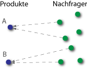 Produktdifferenzierung 2. Ordnung